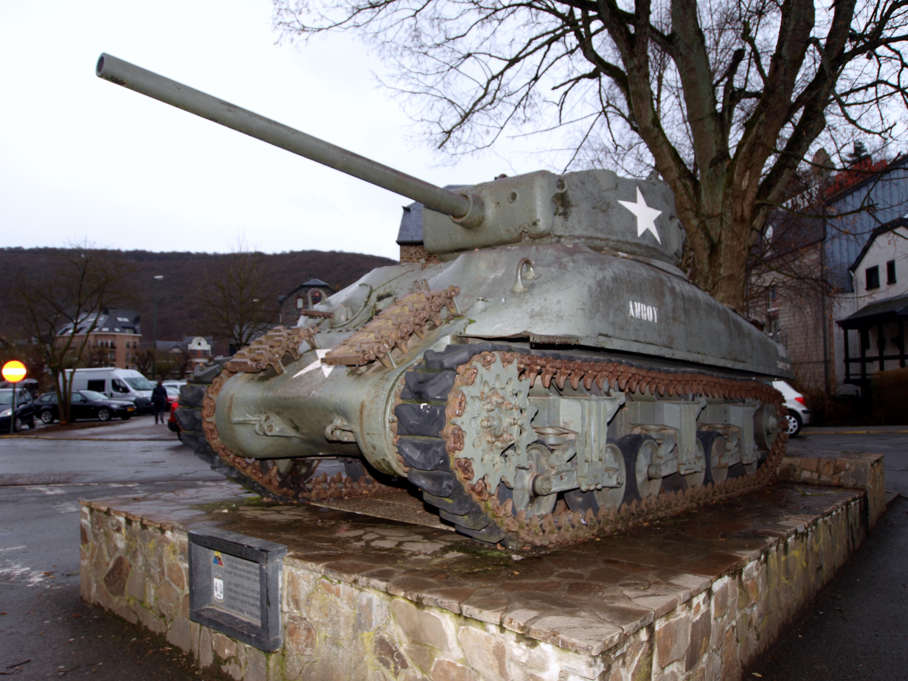 M4A1 Sherman at La Roche-en-Ardenne.